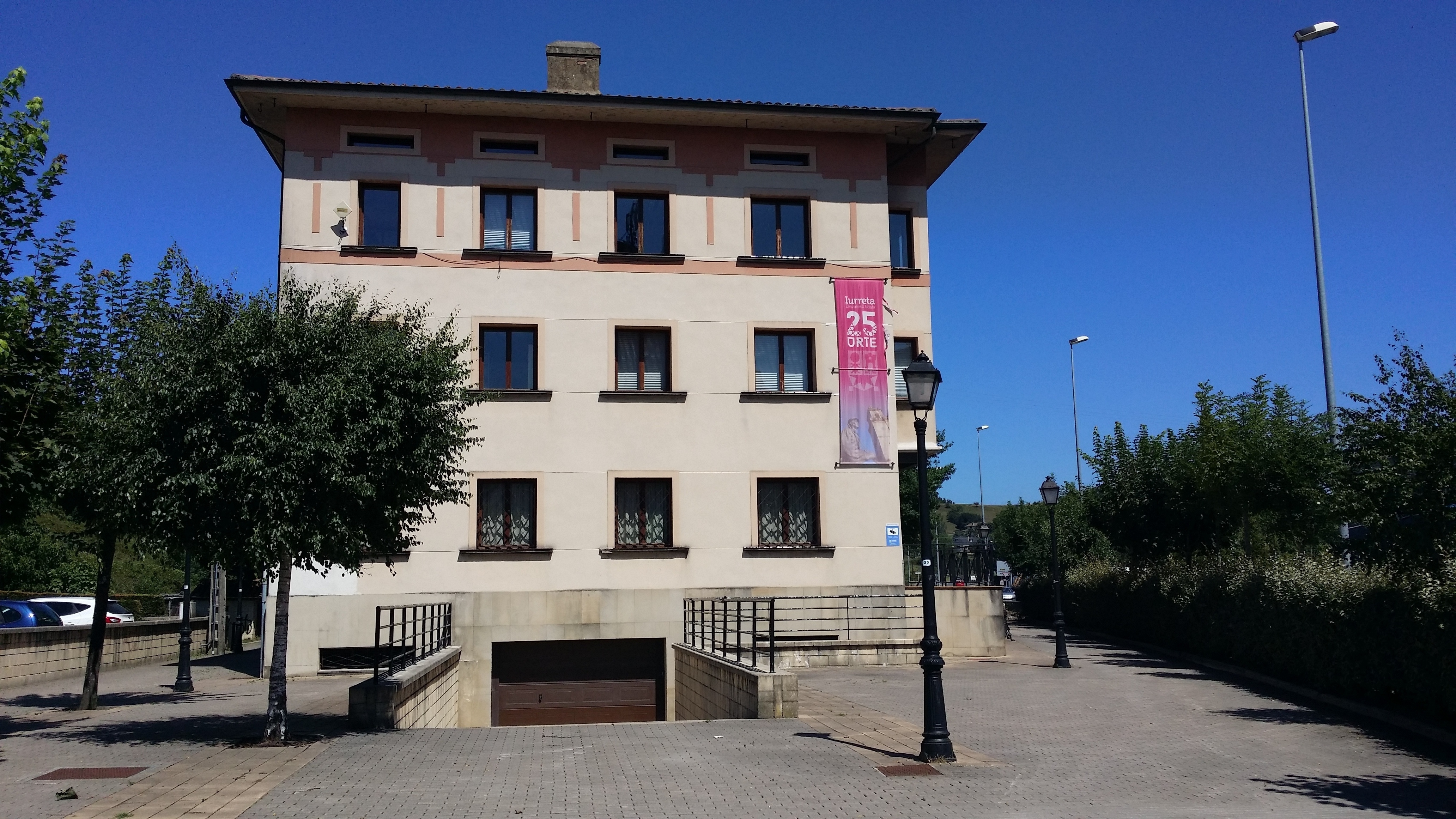 Iurretako kultur etxea